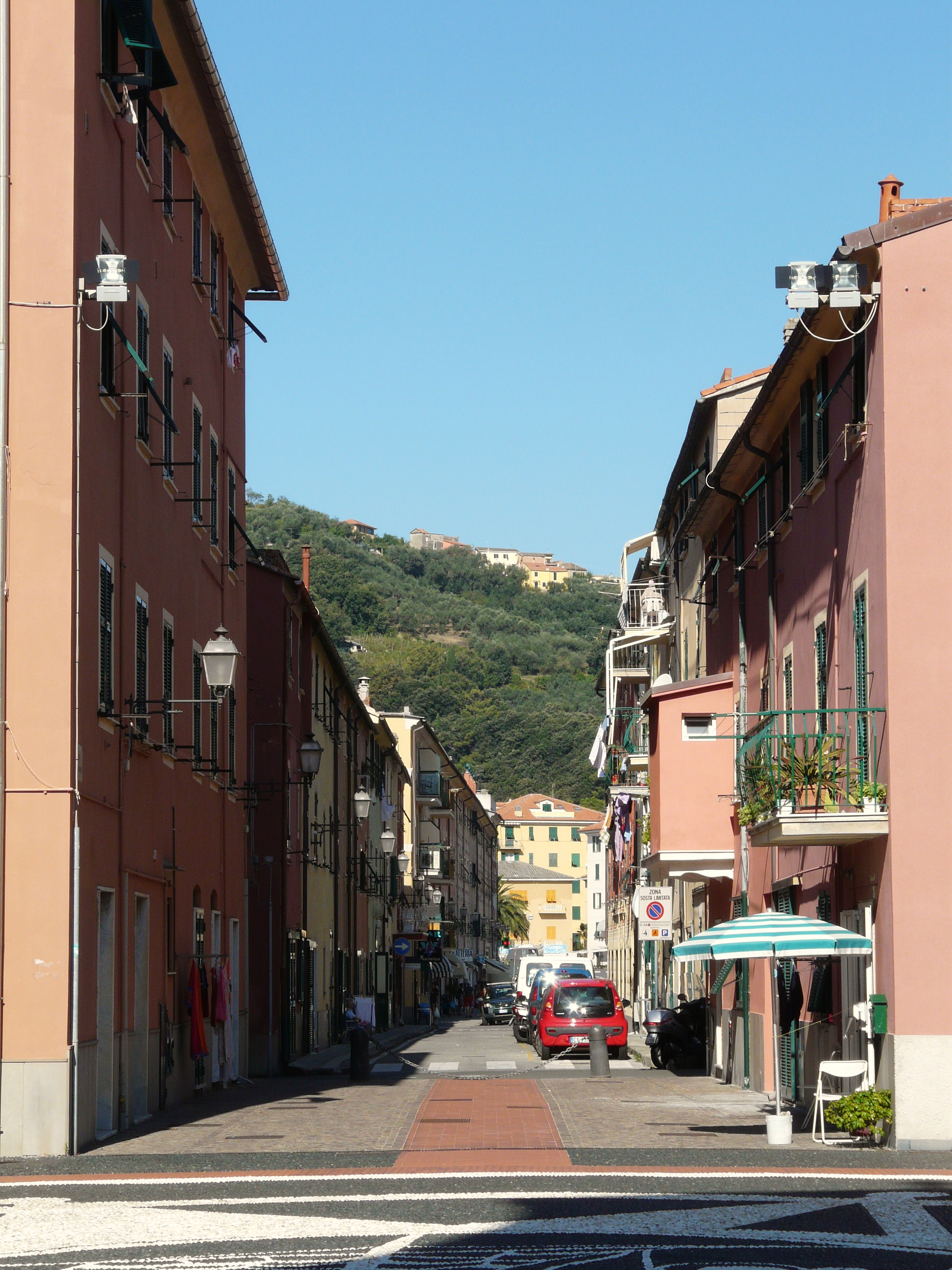 Scorcio di Via della Libertà presso la frazione di Riva Trigoso, Sestri Levante, Liguria, Italia